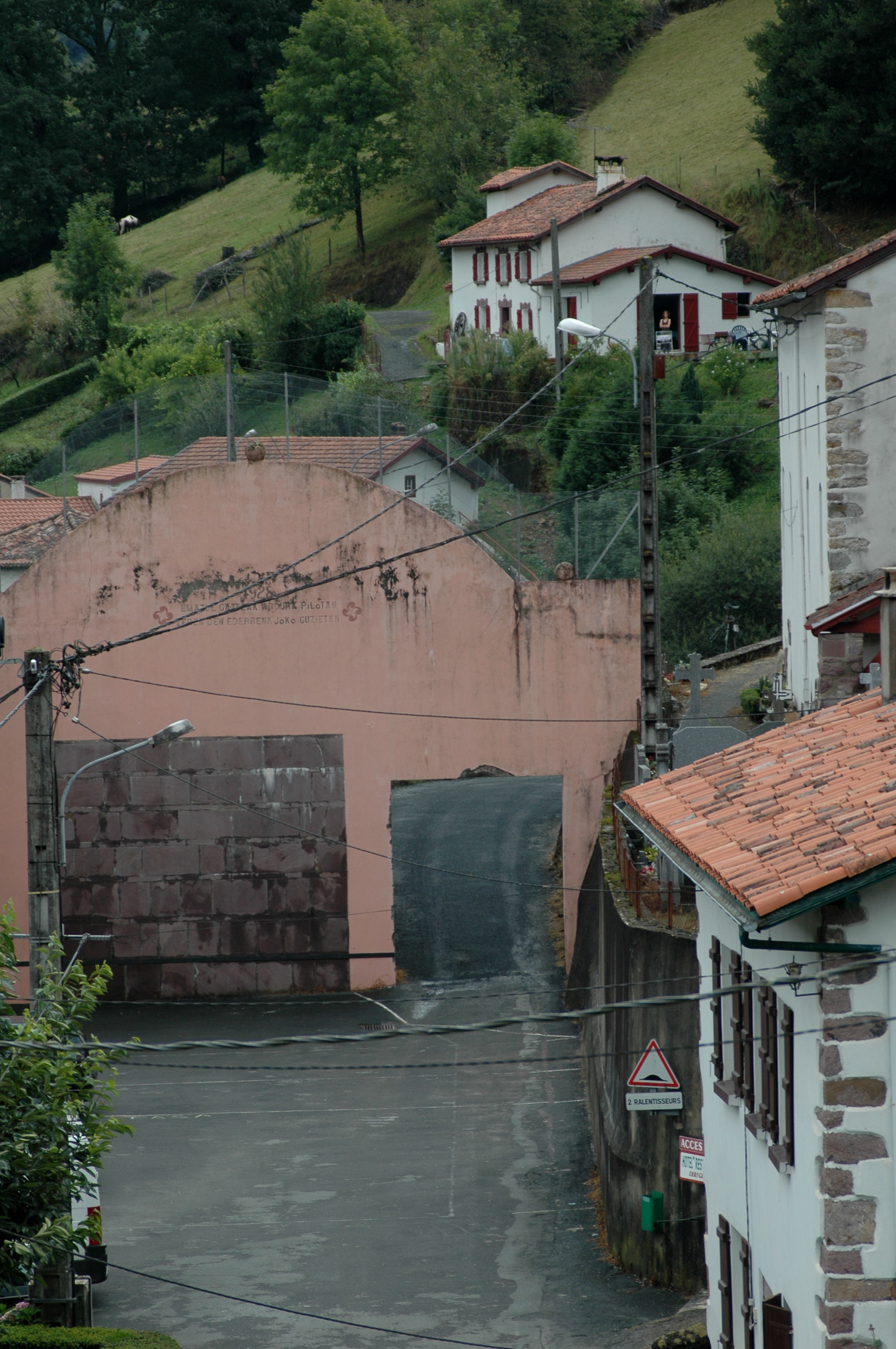 Banca - Le fronton percé